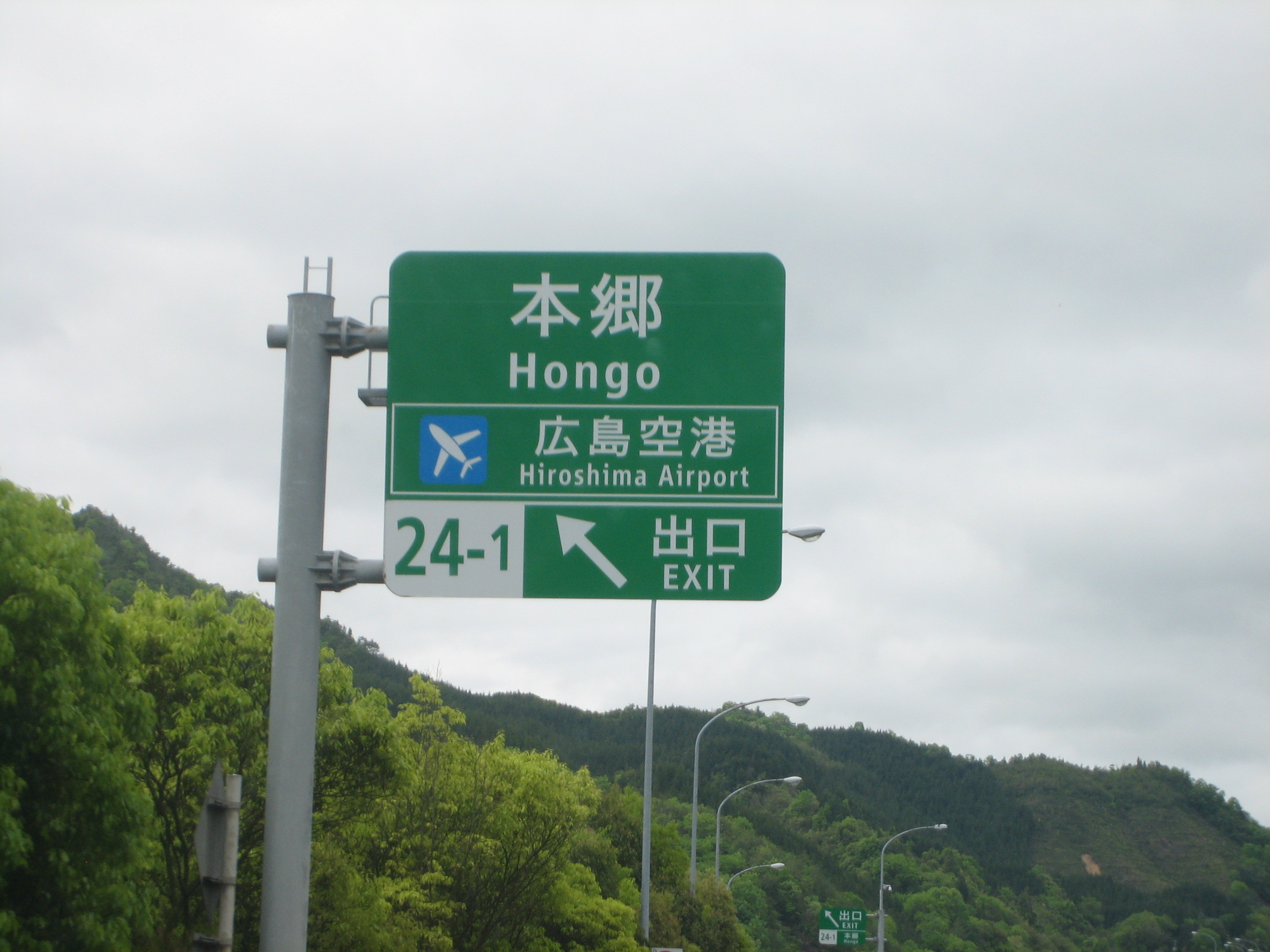 本郷IC